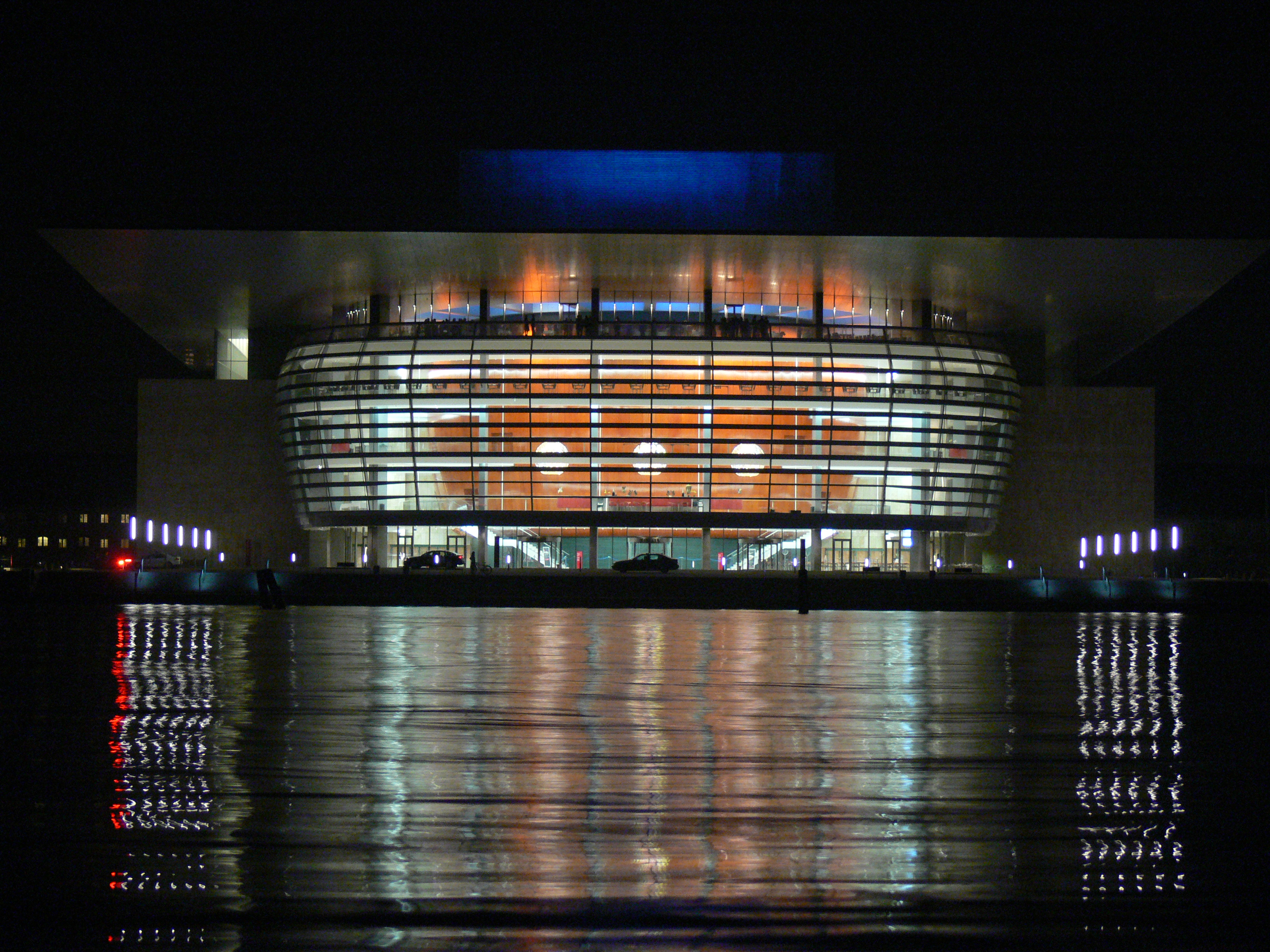 Opernhaus in Kopenhagen